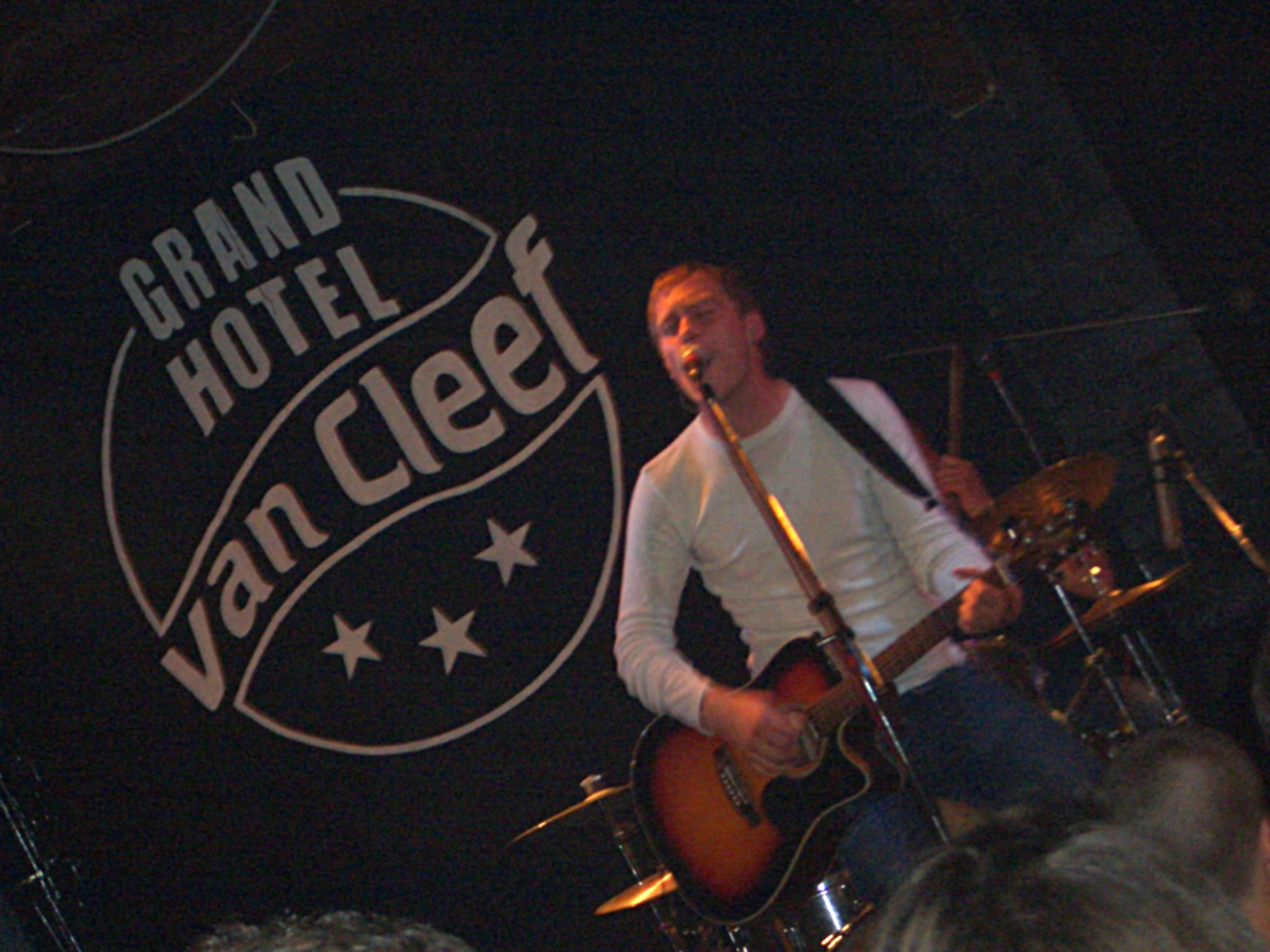 Logo & Thees Uhlmann, Platenlaase 2005